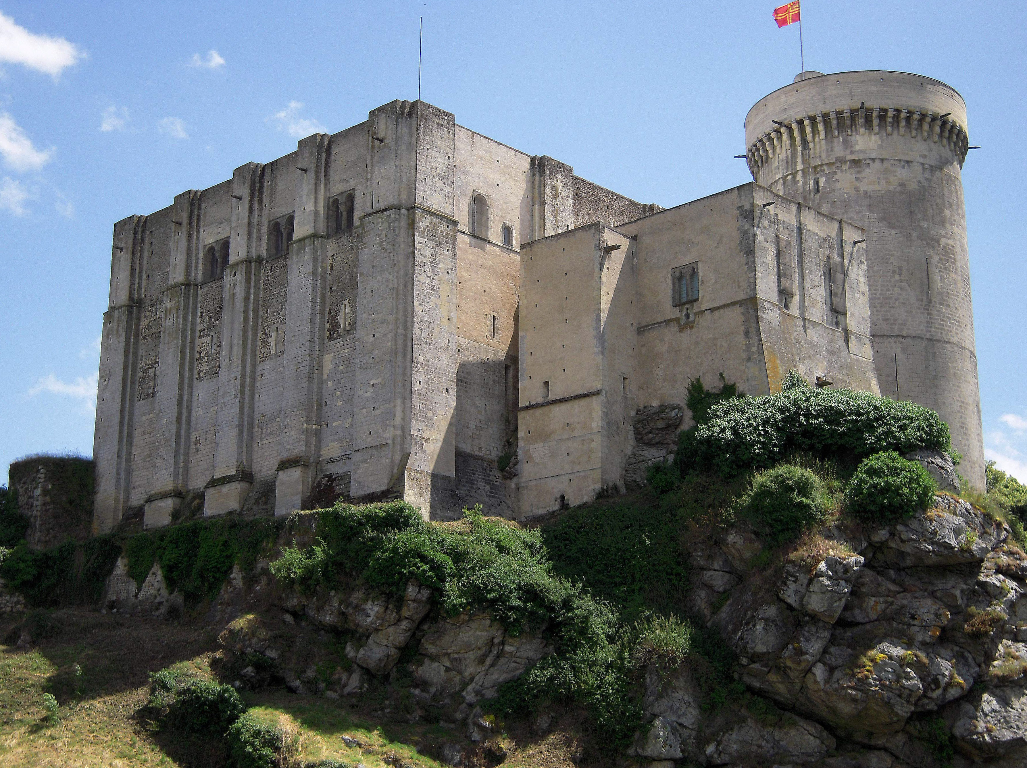 Château médiéval de Falaise (Normandie), lieu de naissance de Guillaume le Conquérant